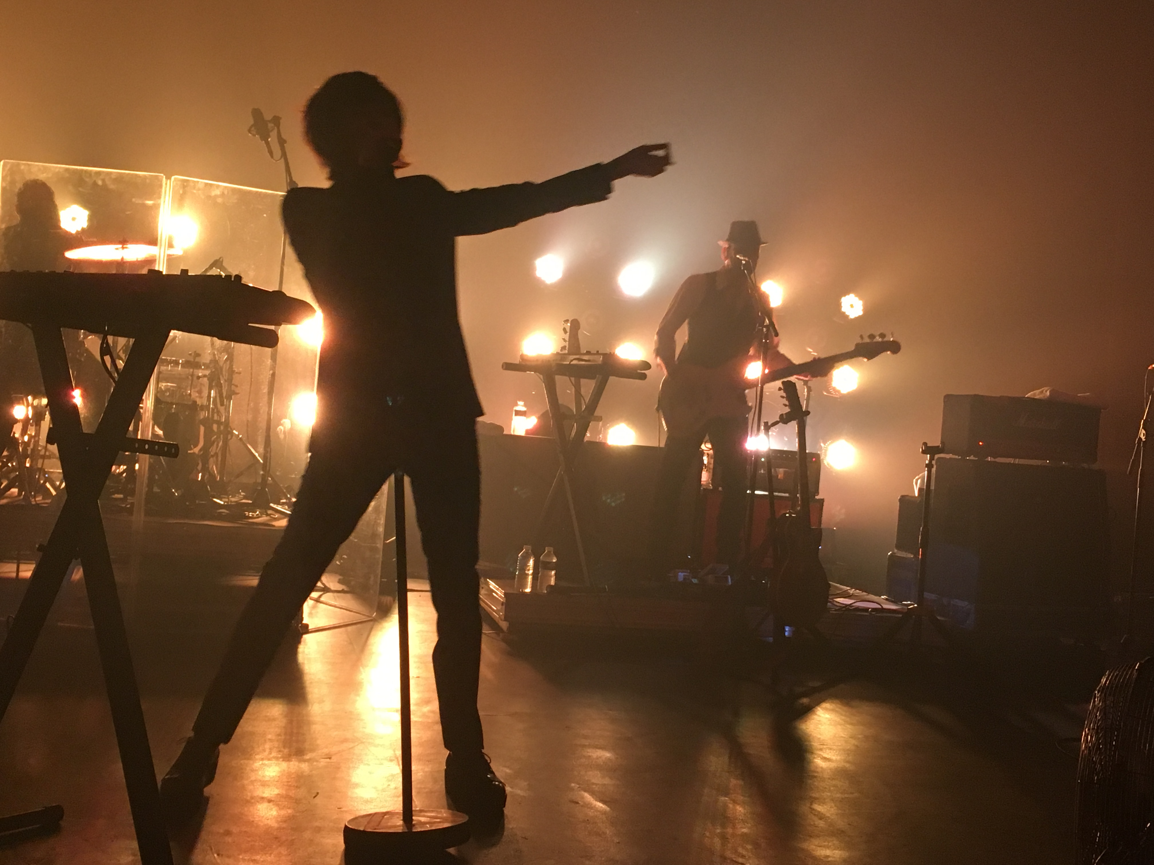 Superbus à La Fare-les-Oliviers le 13 octobre 2017